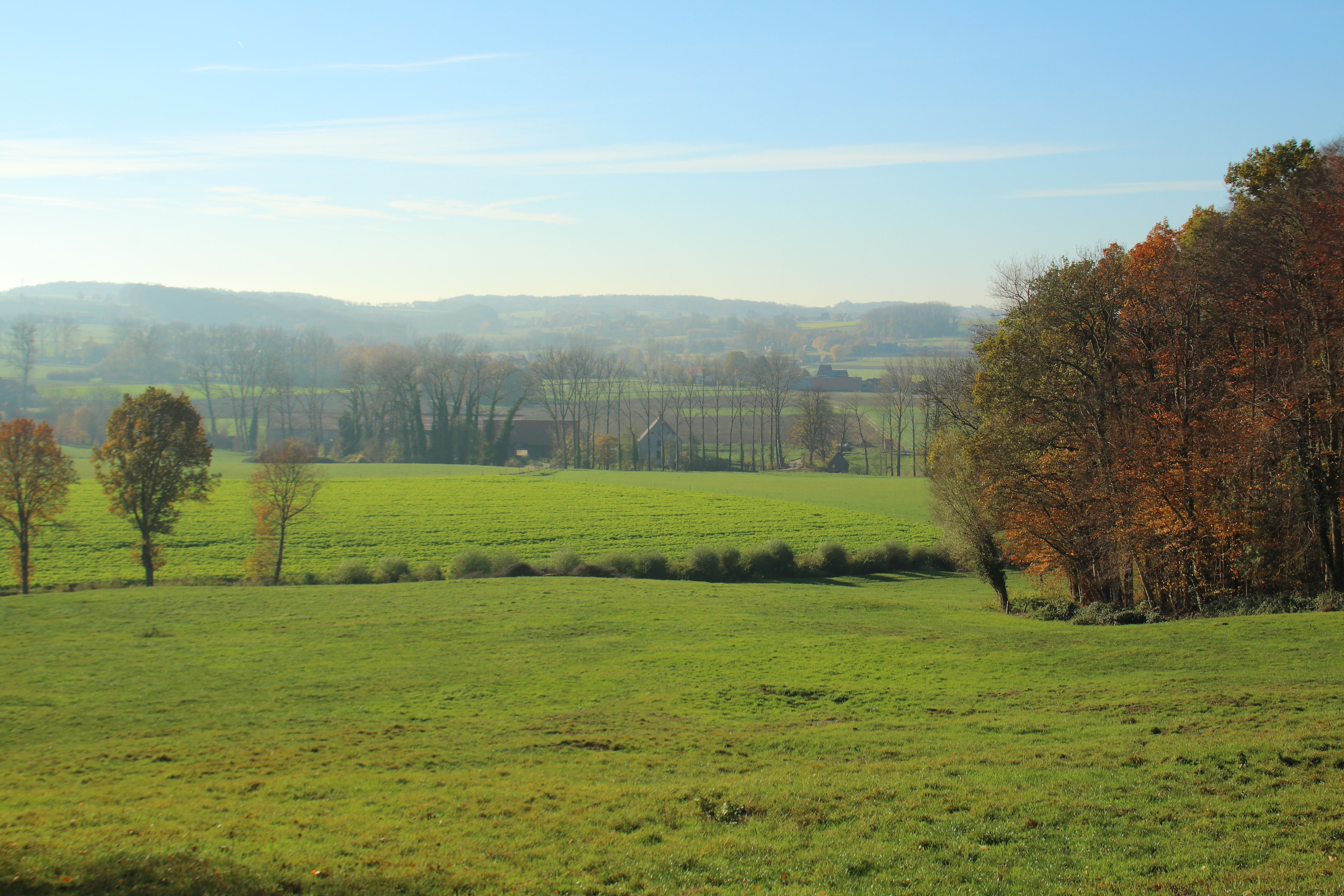 Vlaamse Ardennenlandschap, Kluisbergen, Vlaanderen, België